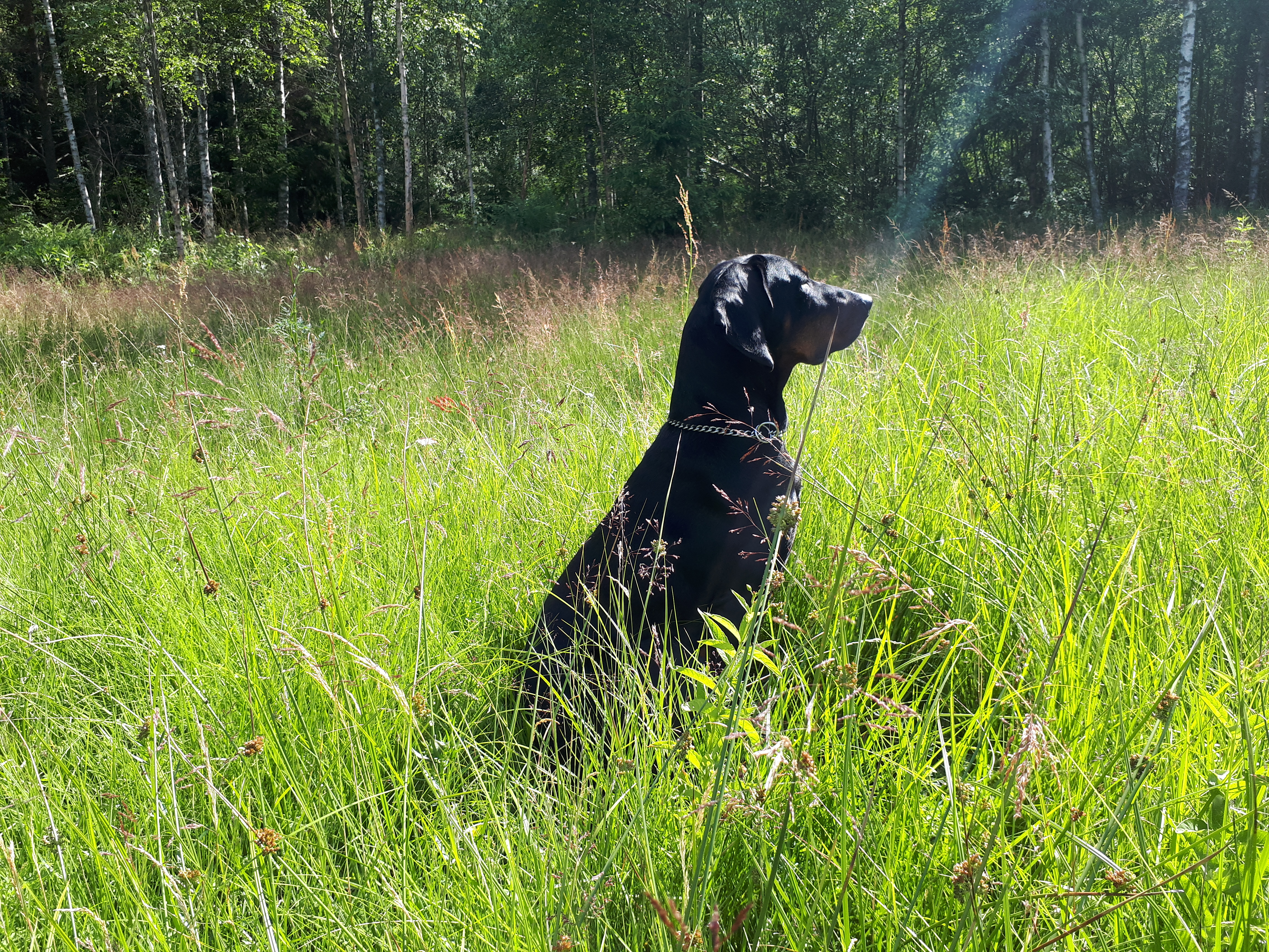 Gonczy Polski sommarbild